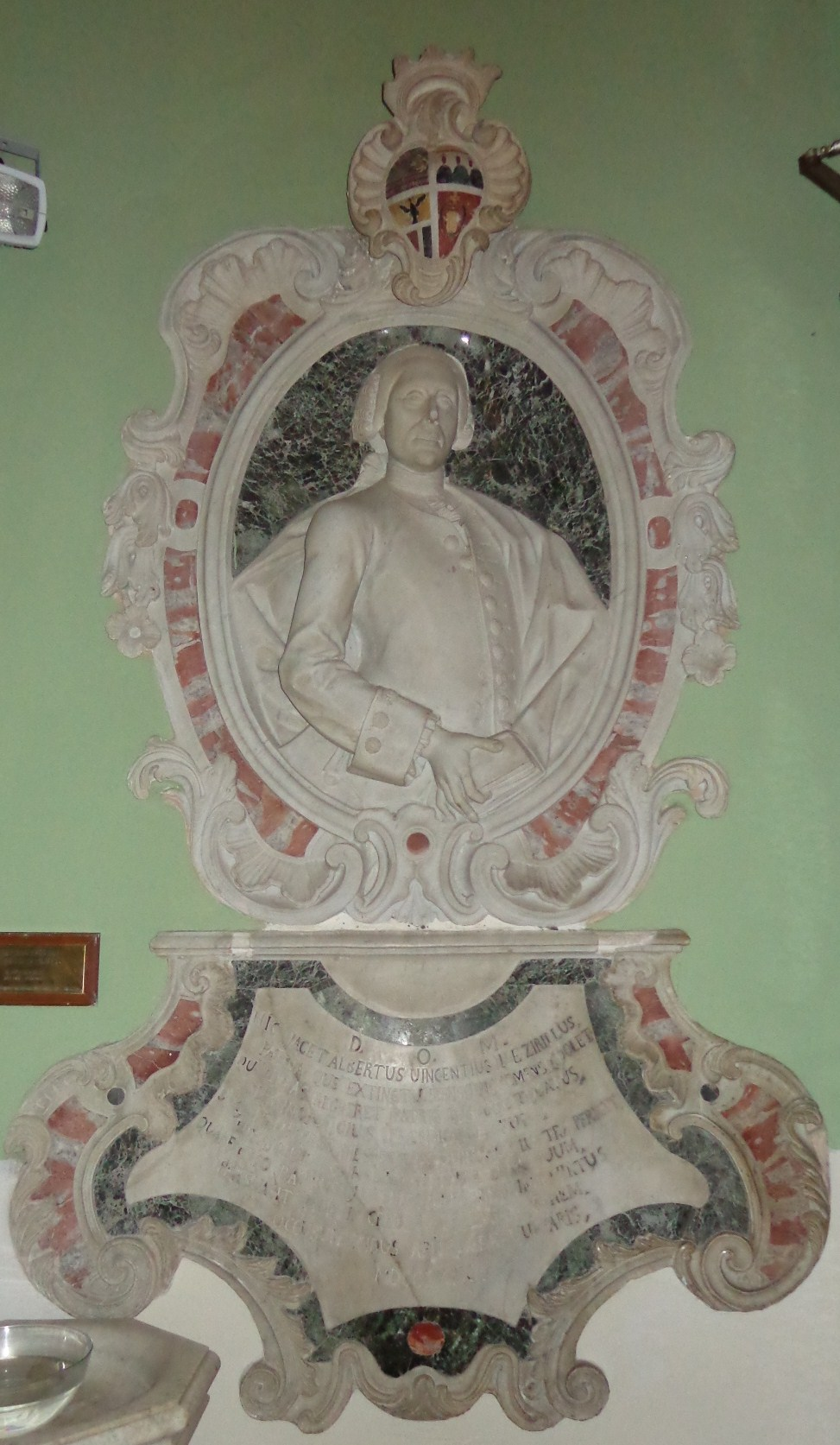 Sepolcro uno